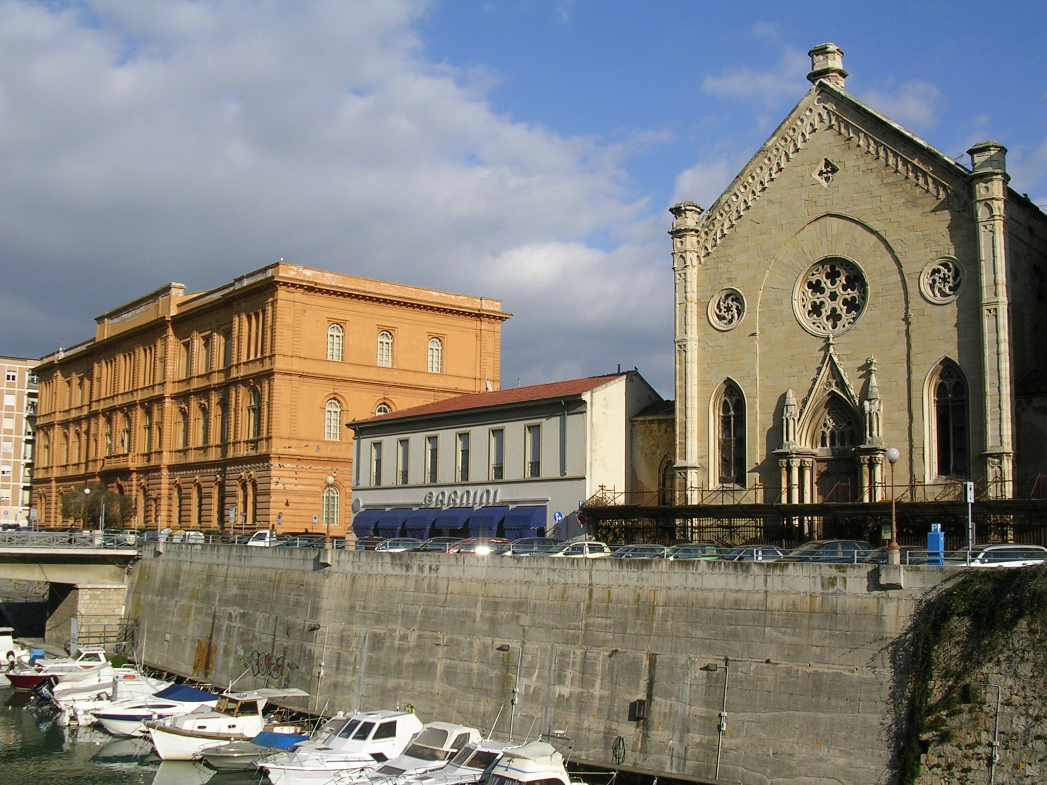 Livorno: il Fosso Reale tra il Tempio della Cogregazione Olandese Alemanna e le Scuole Benci, nel tratto crollato ben oltre un decennio orsono e non ancora ripristinato con le pietre di rivestimento.